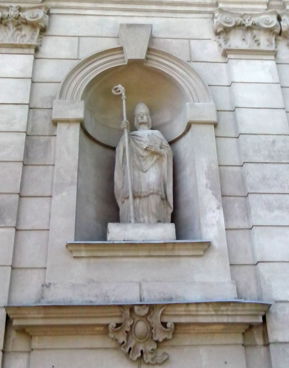 Костел святого Войцеха у с. Гвардійське. Одна зі статуй, що прикрашають фасад.